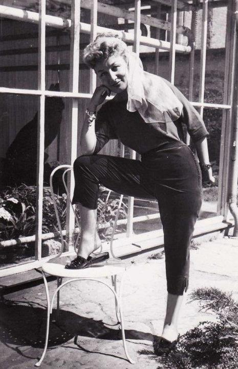 Mady Rahl modelt Sommermodell der Caprihose